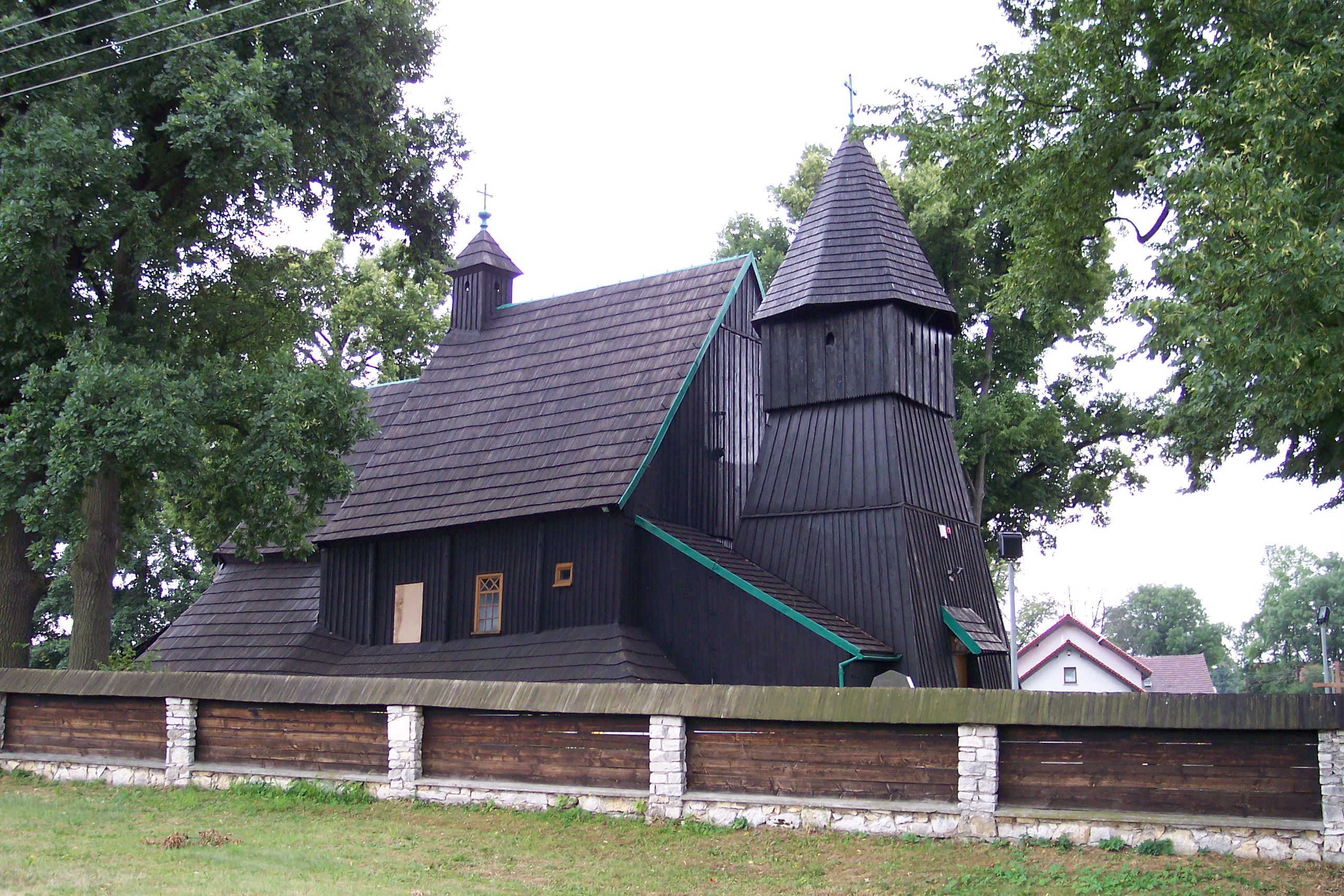 Kościół Wszystkich Świętych w Bojszowie